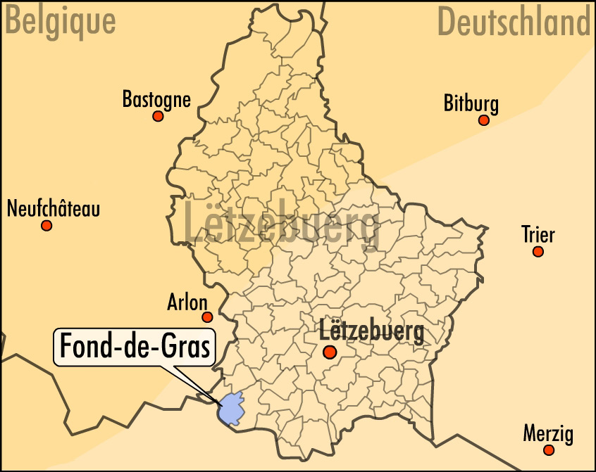 Geografesch Laag vu Fond de Gras